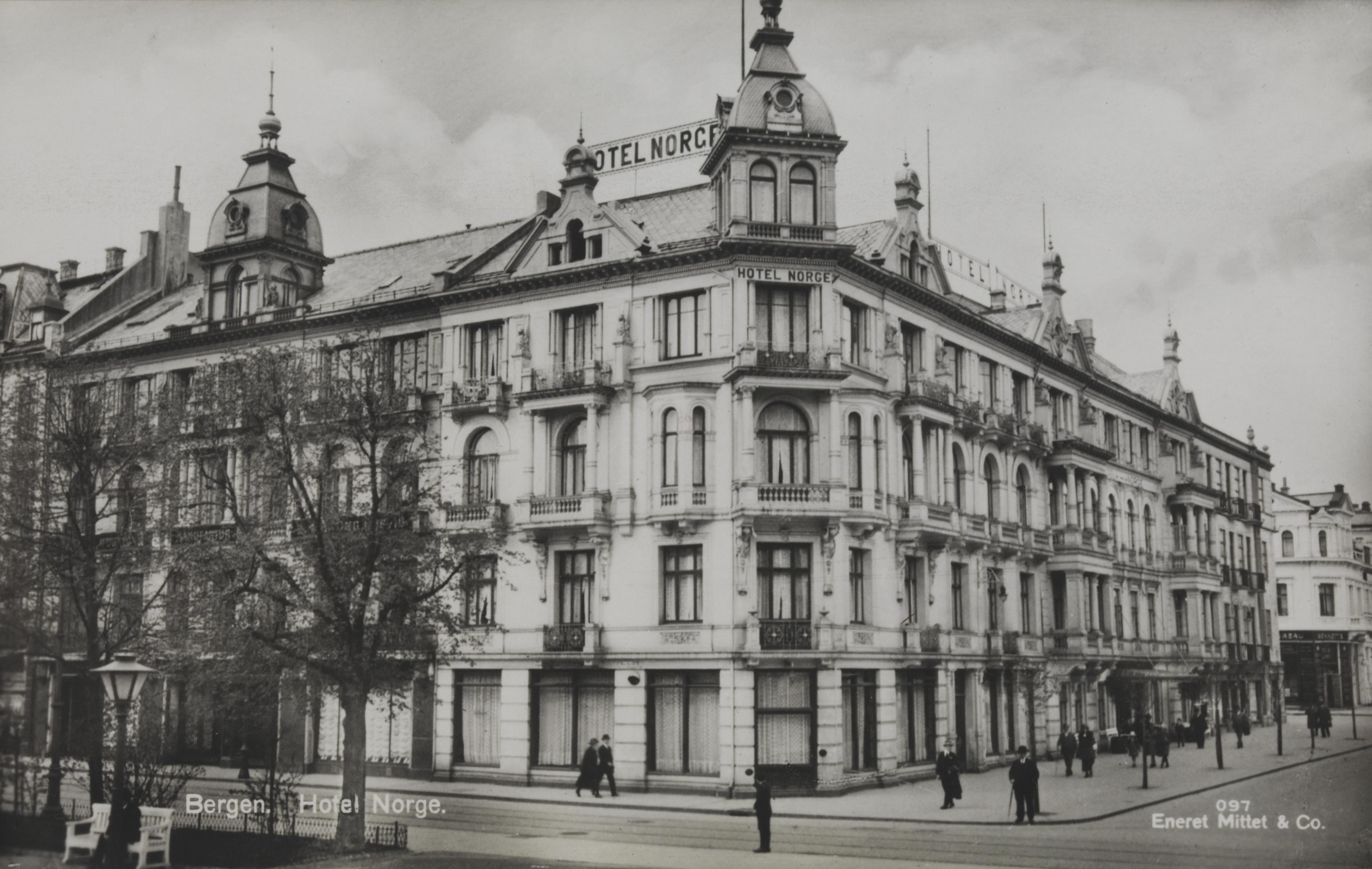 Bildet er hentet fra Nasjonalbibliotekets bildesamling Bergen, Hordaland